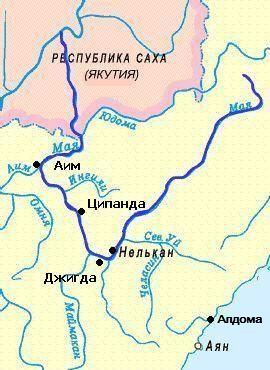 Карта реки Мая